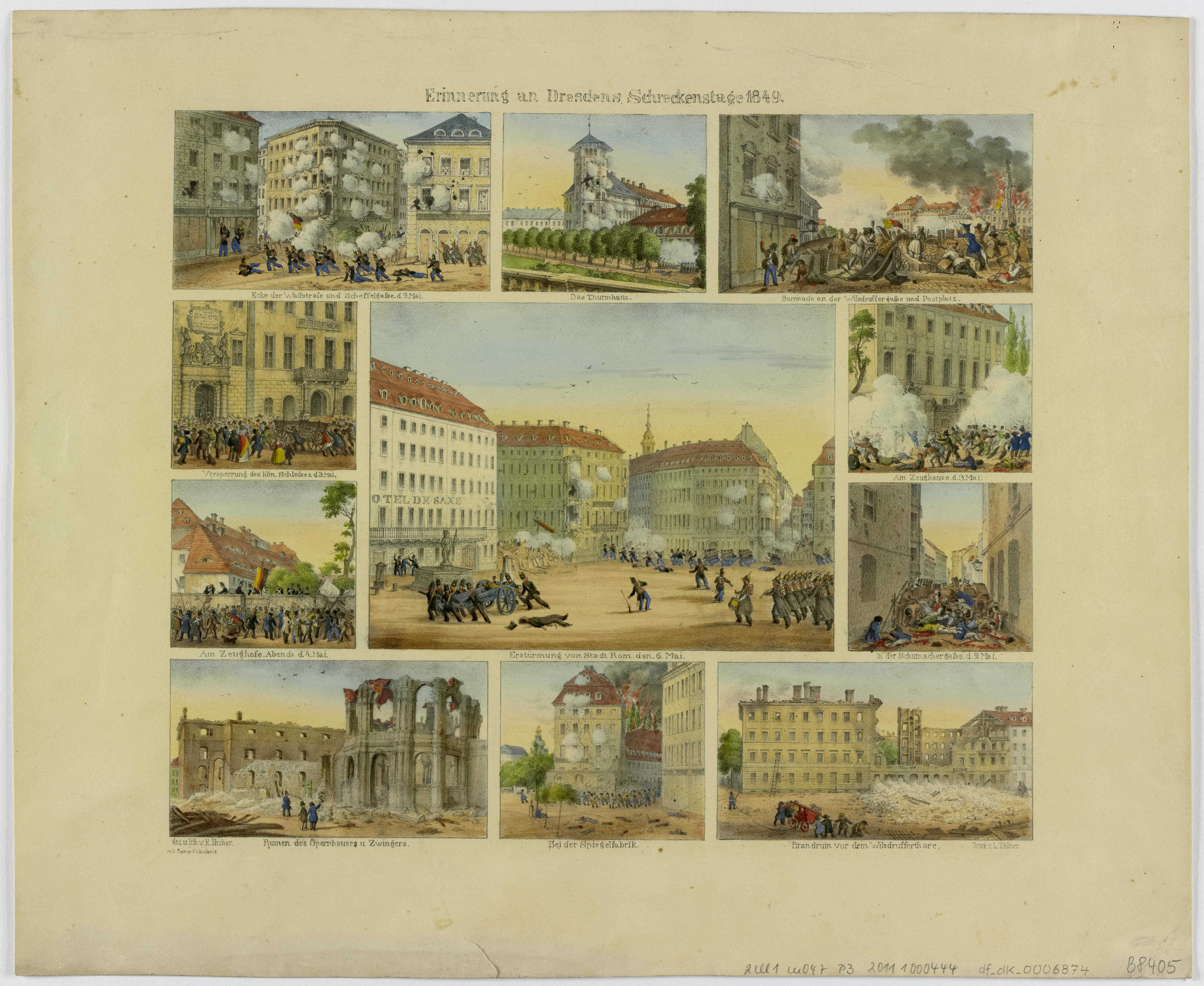 Erinnerung an Dresdens Schreckenstage / gez. u. lith. v. E. Fischer. Druck von L. Zöllner [S.l.], [nach 1849]. - 11 Ansichten auf 1 Kunstbl. : mehrfarb. Lithogr. ; Blattgr. 43 x 35 cm